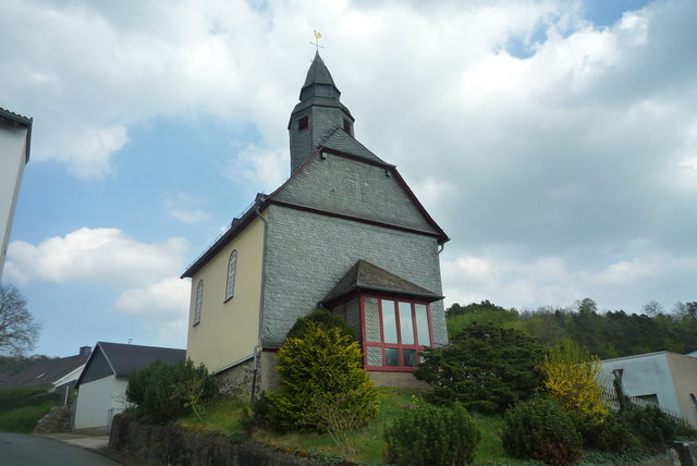 Evangelische Kirche in Dreisbach